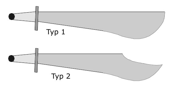 2 verschiedene Falchions, gemalt mit Corel Photo-Paint